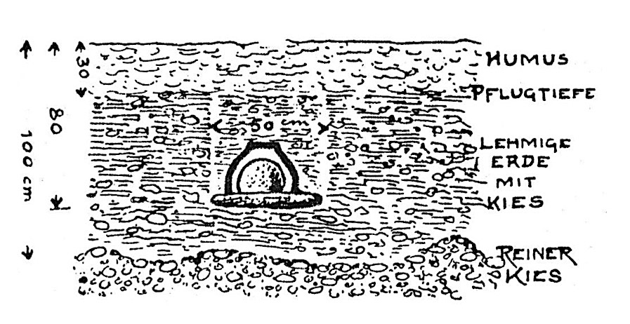 Goldschale von Altstetten Skizze der Fundsituation, 1906 von einem Arbeiter erstellt